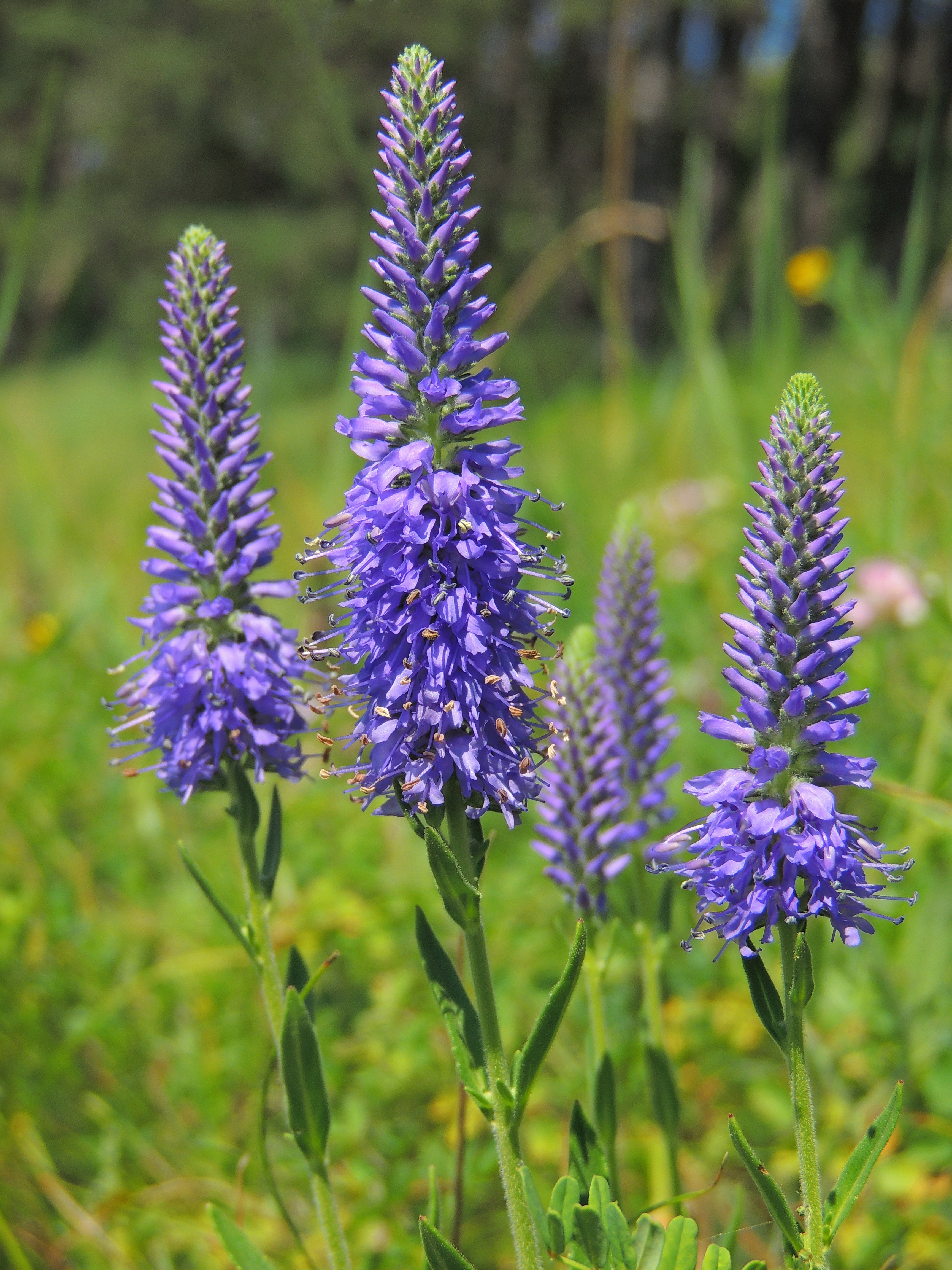 speedwell Ähriger Ehrenpreis șopârliță